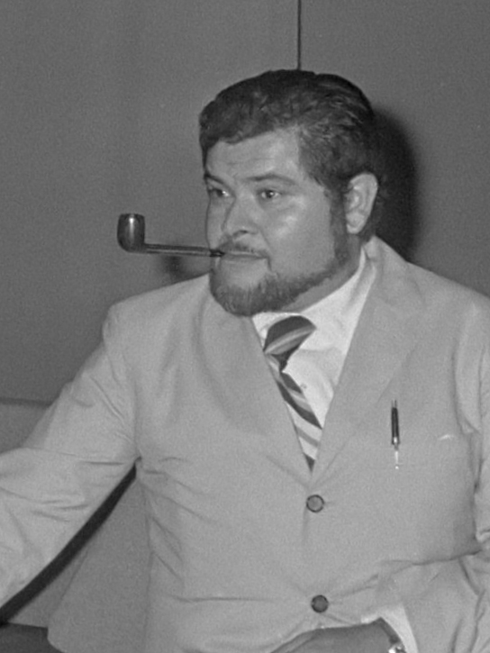 Tentoonstelling woningtextiel in Marijkehal, Utrecht: prof. Colombo bij een ziteenheid, door hem ontworpen